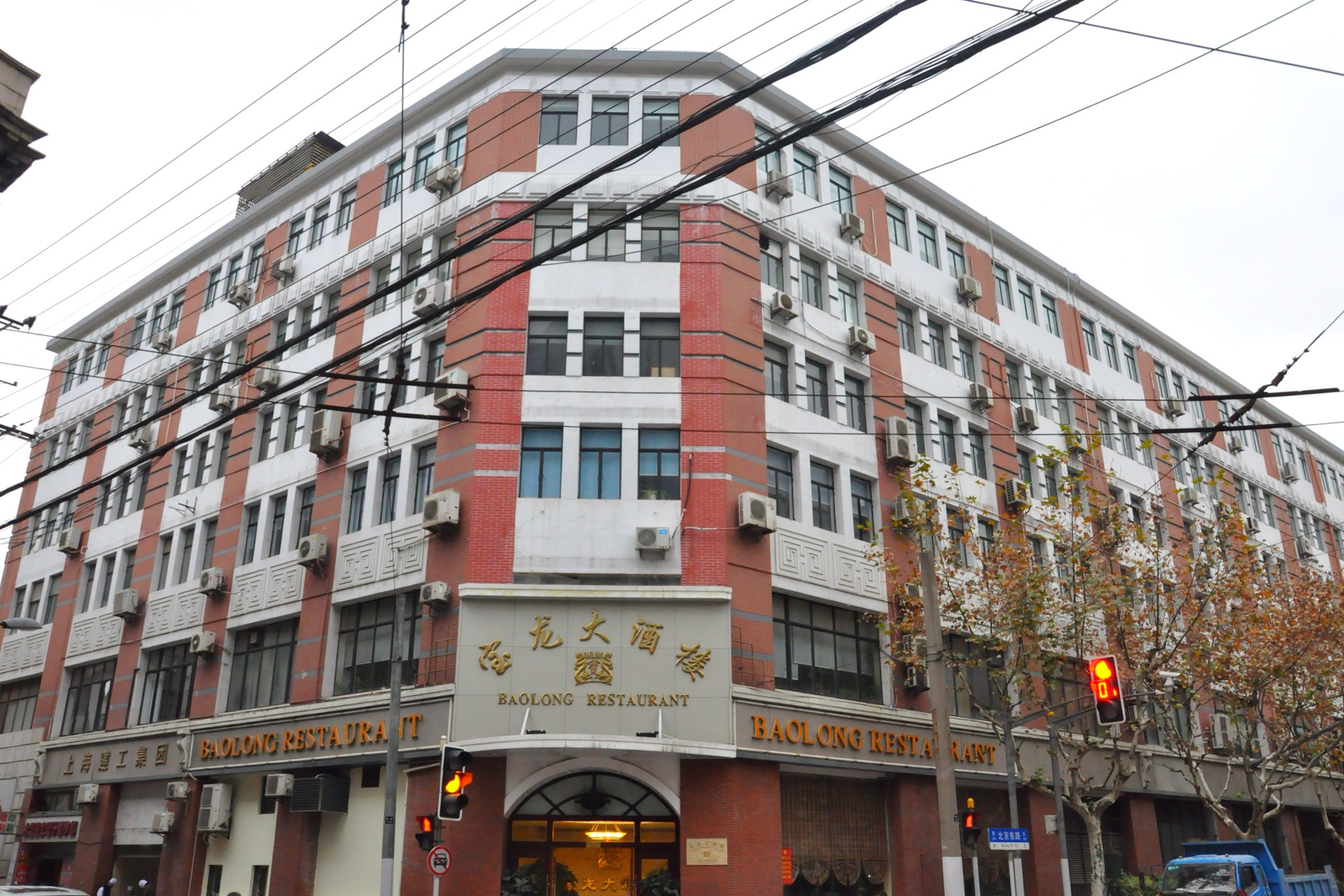 浙江兴业银行旧址